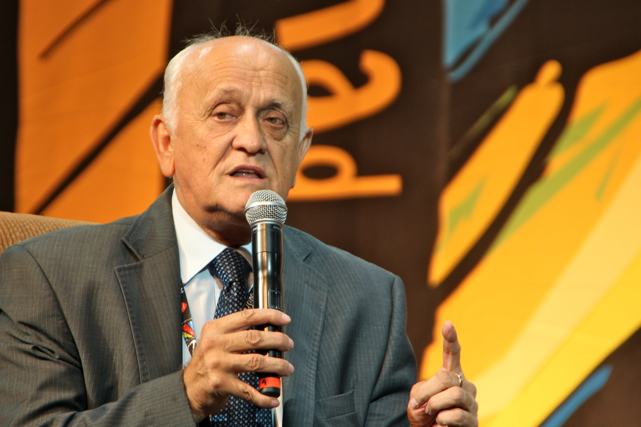 Przystanek Woodstock w 2012 r.